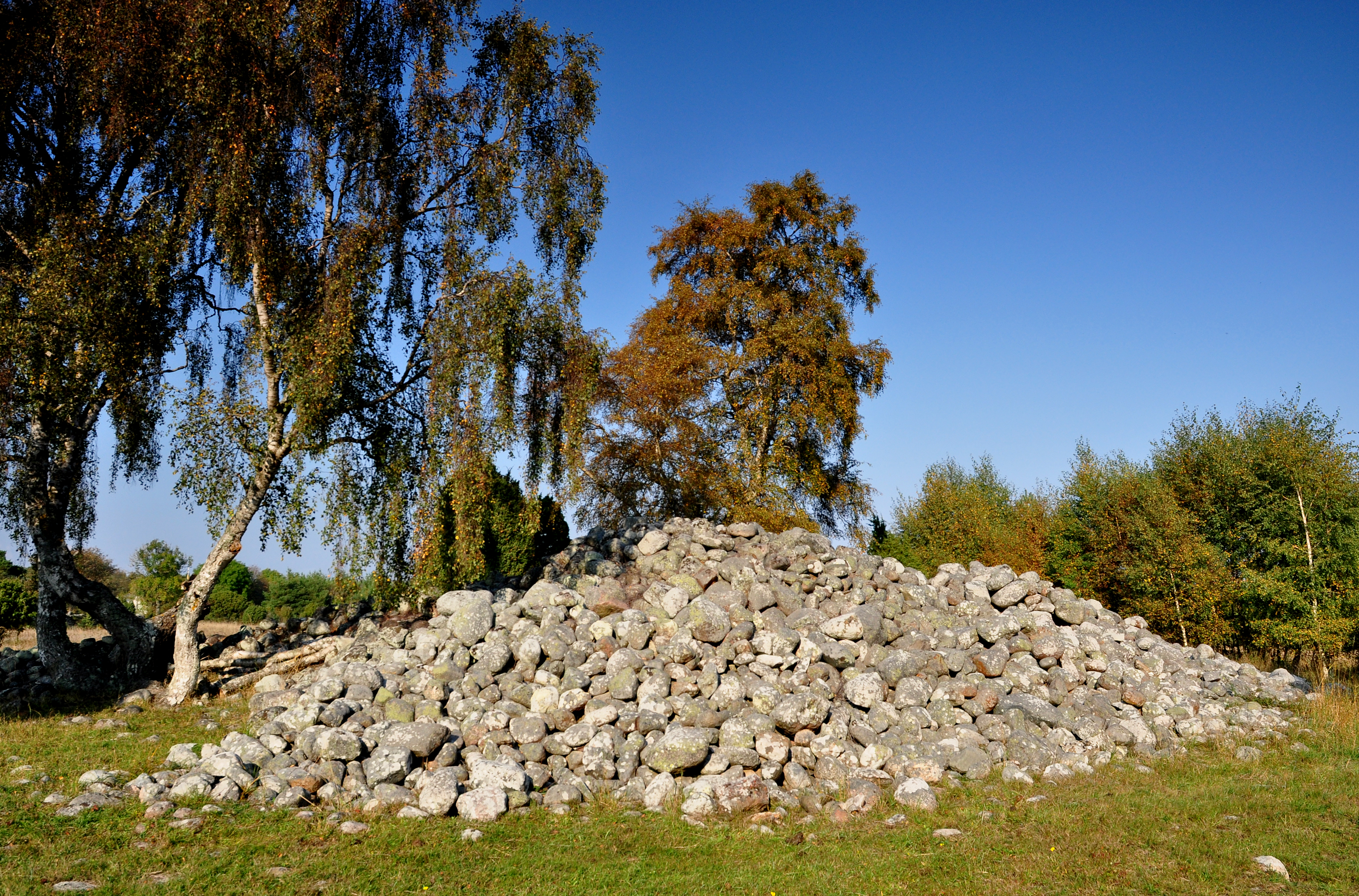 Ett stort röse med kantkedja. I röset hittades år 1826 en bronsdolk. Röset är delvis raserat och har använts som stentäkt.